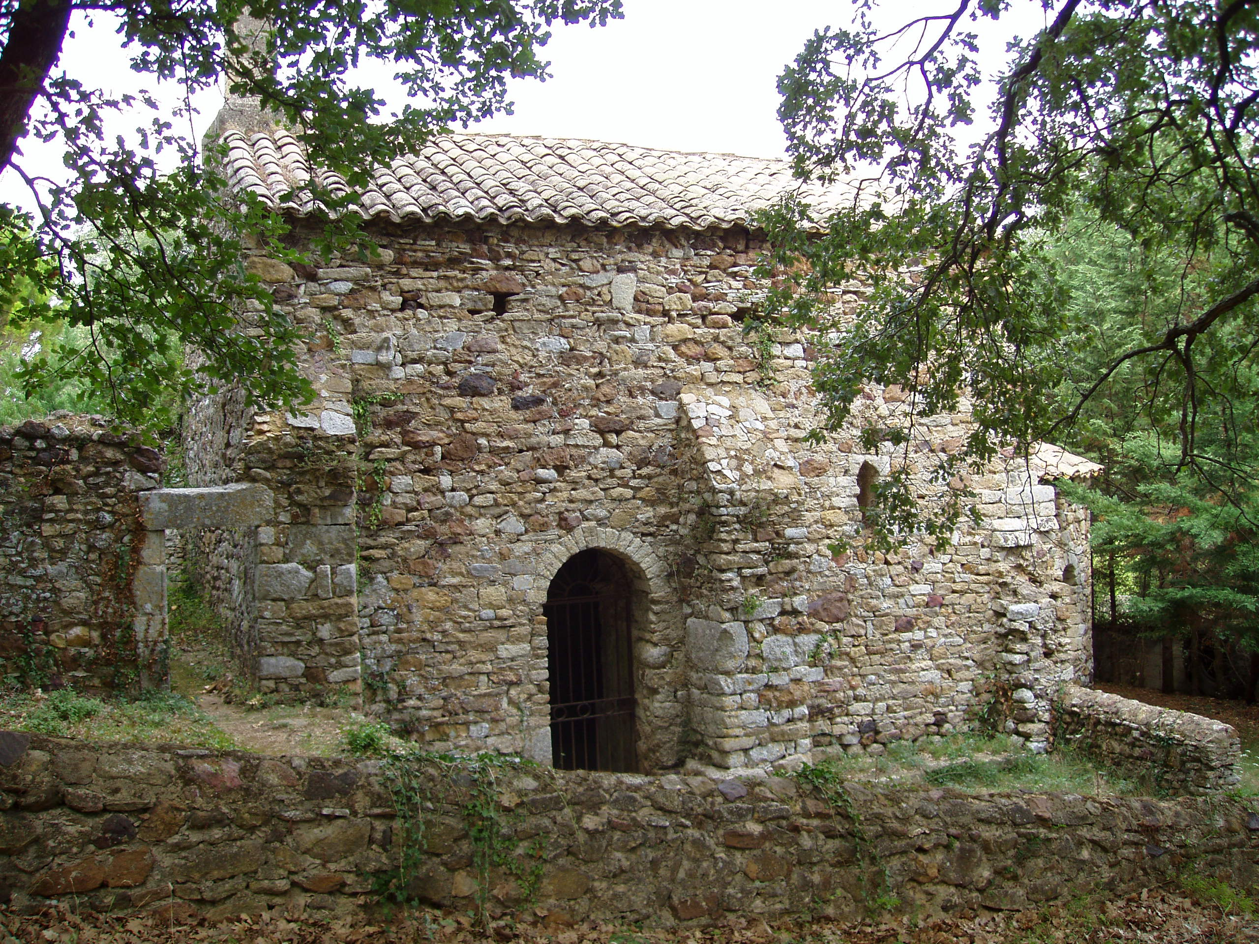 Chapelle Saint-Saturnin de Gaujac (Gard)